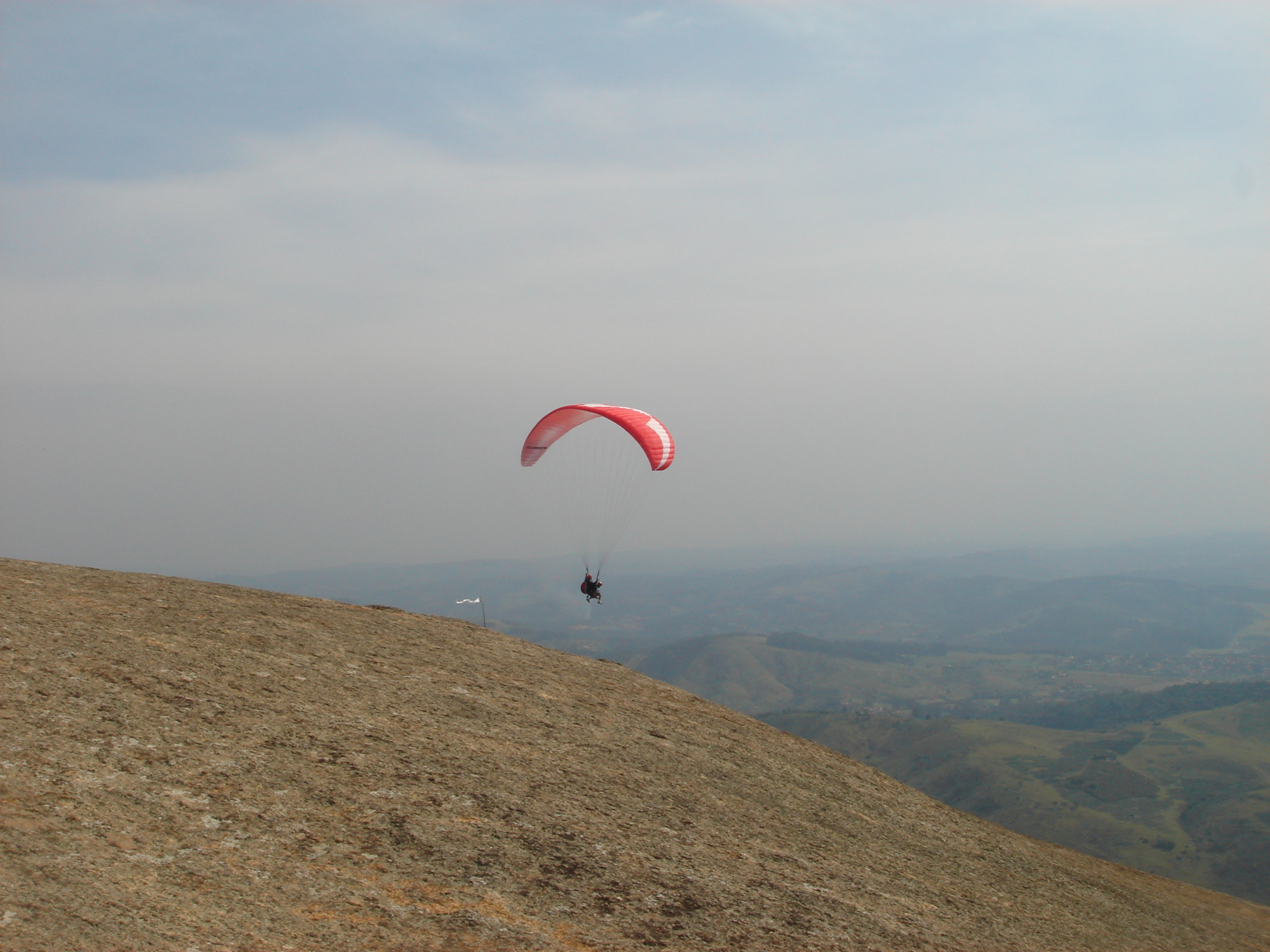 Para-glider, Pedra Grande, Atibaia